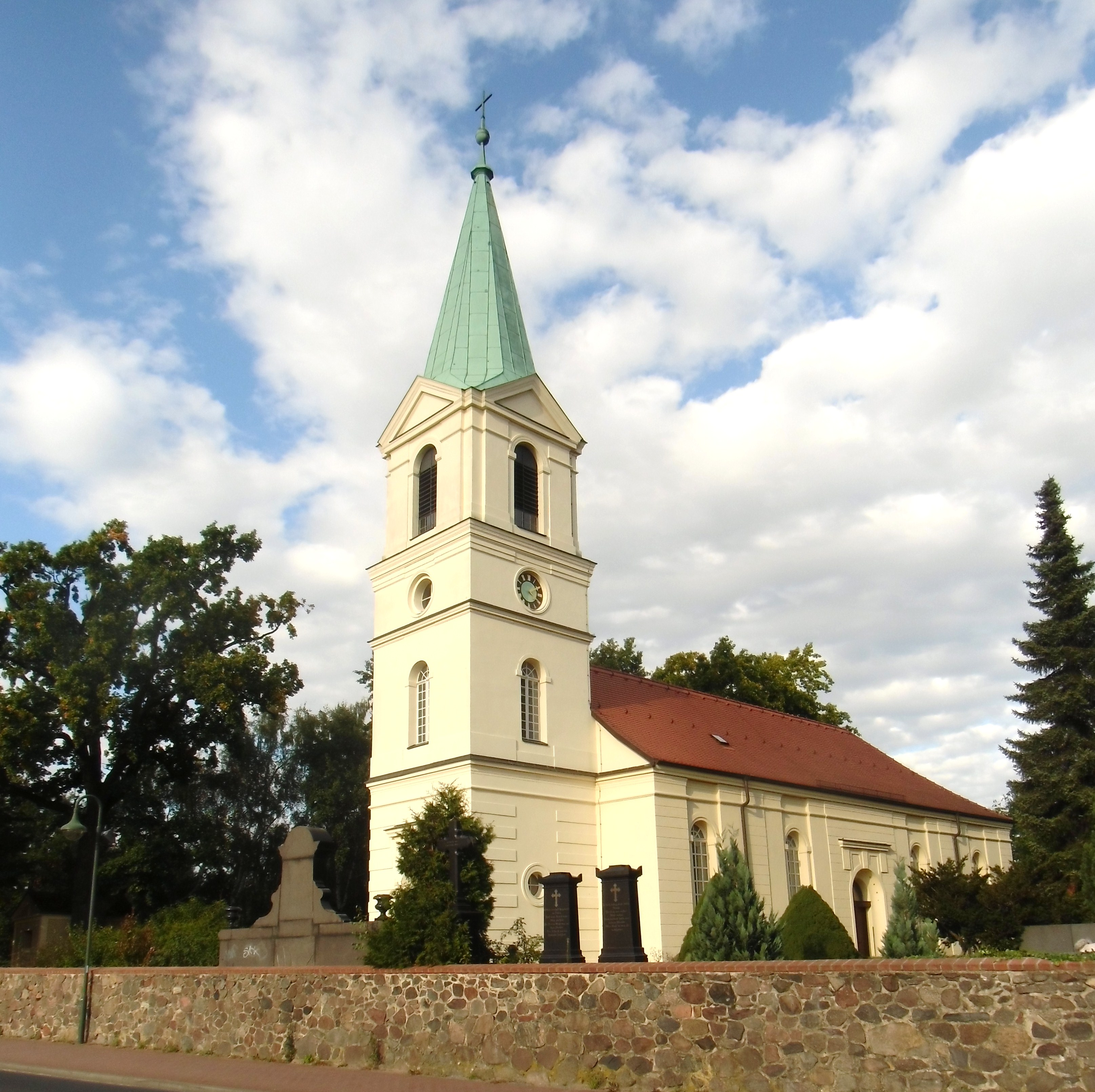 Denkmalgeschützte evangelische Dorfkirche von Ahrensfelde, 1768 erbaut. Nr. 2 in der Liste der Baudenkmale in Ahrensfelde